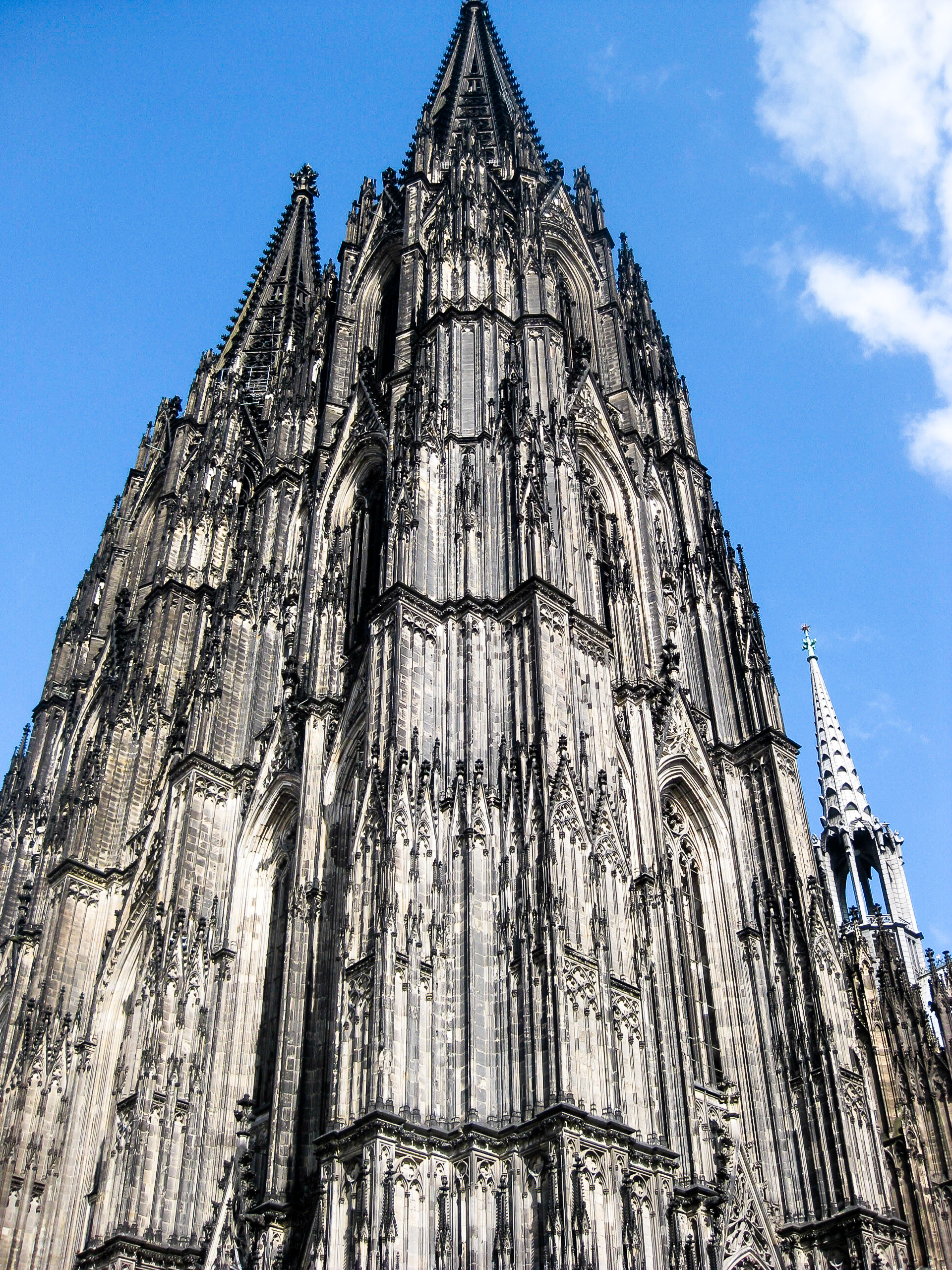 Kölner Dom